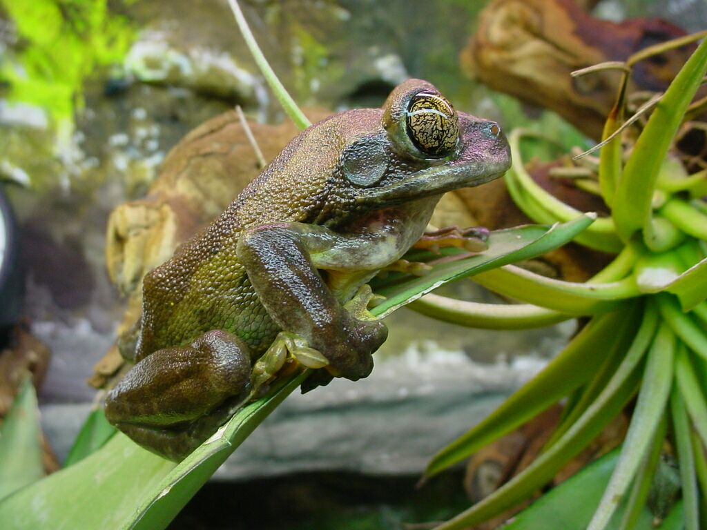 Grüner Waldsteigerfrosch, auch Juwelenlaubfrosch oder Blaufuß-Waldsteigerfrosch genannt (Leptopelis vermiculatus), weiblich, adult, Terrarienaufnahme.